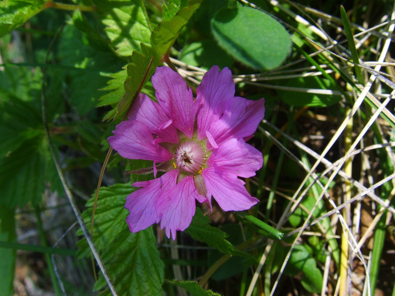 Цветок княженики обыкновенной